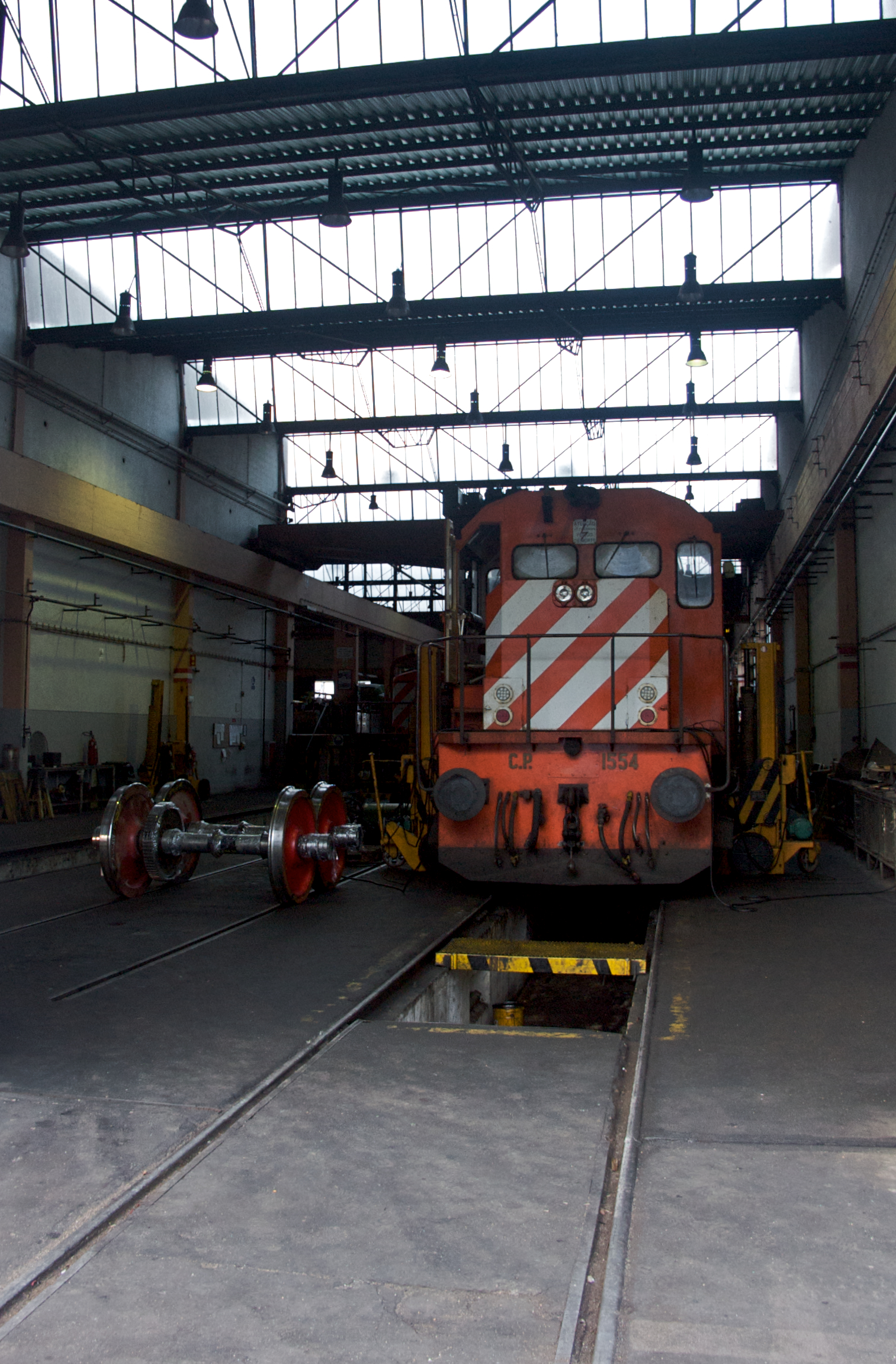 em reparações. Local: Entroncamento (EMEF-GOE) [Linha do Norte, PK 106] Data e hora: 1 de Novembro de 2008 [17h04] Material: Locomotiva 1554 [Montreal Locomotive Works • Alco] N.º UIC: 9094 121 1554-7